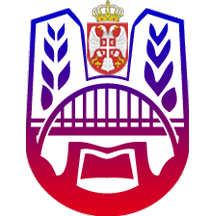 Grb opstine Zubin Potok